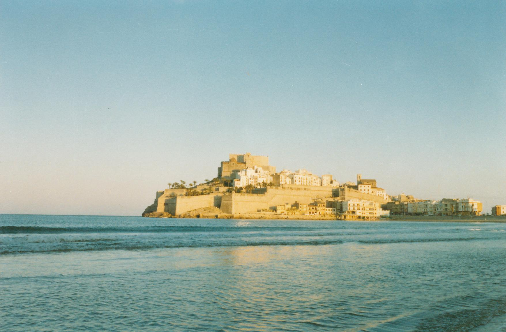 Festungsburg Peñíscola Datum: 06/1989 Urheber: Michael Pfeiffer Quelle: privates Fotoalbum des Urhebers